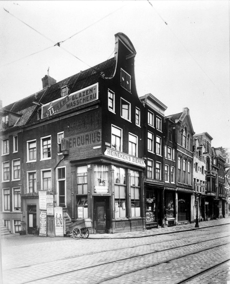 exterieur reproductie van foto